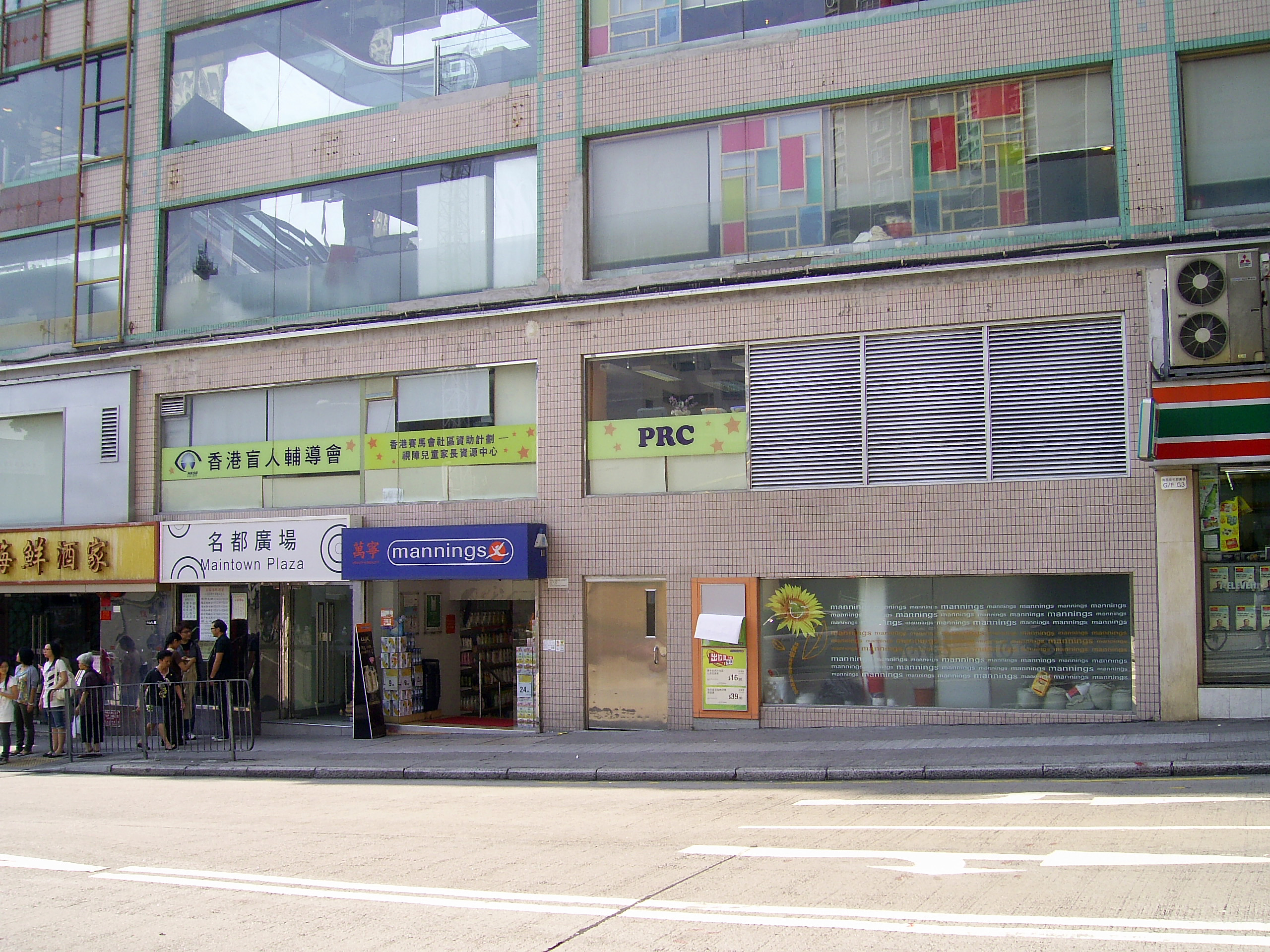 中文（香港）: 視障兒童家長資源中心